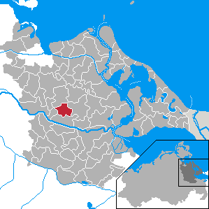 Schmatzin, Landkreis Ostvorpommern, Mecklenburg-Vorpommern